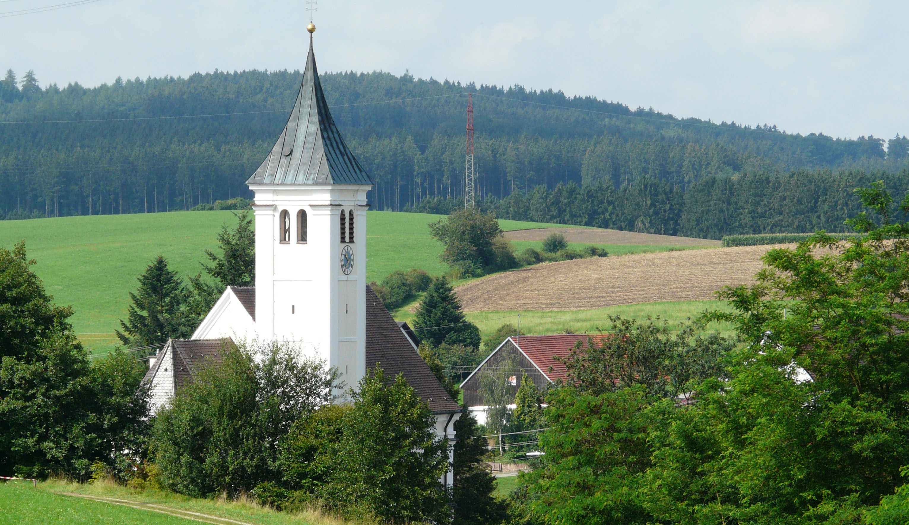 Kirche in Aichen